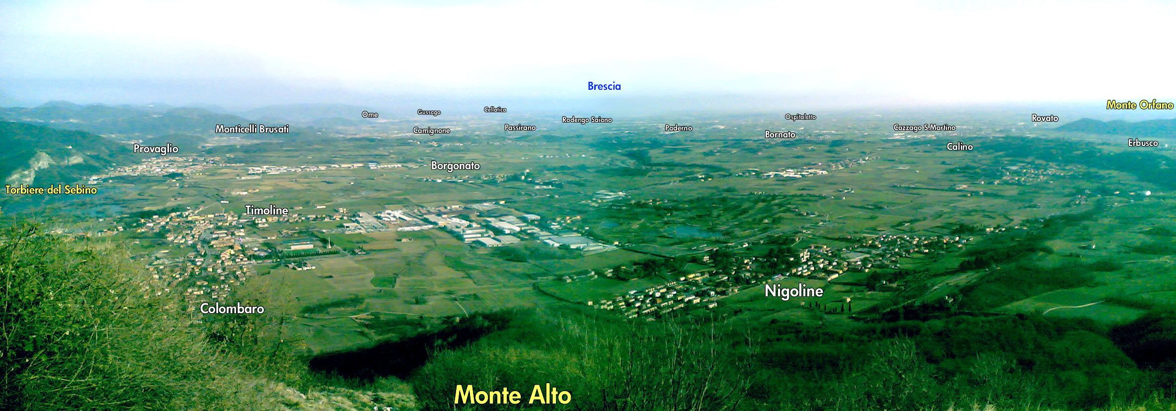 Franciacorta